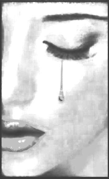 Dibujo representando a La Llorona, leyenda hispanoamericana.